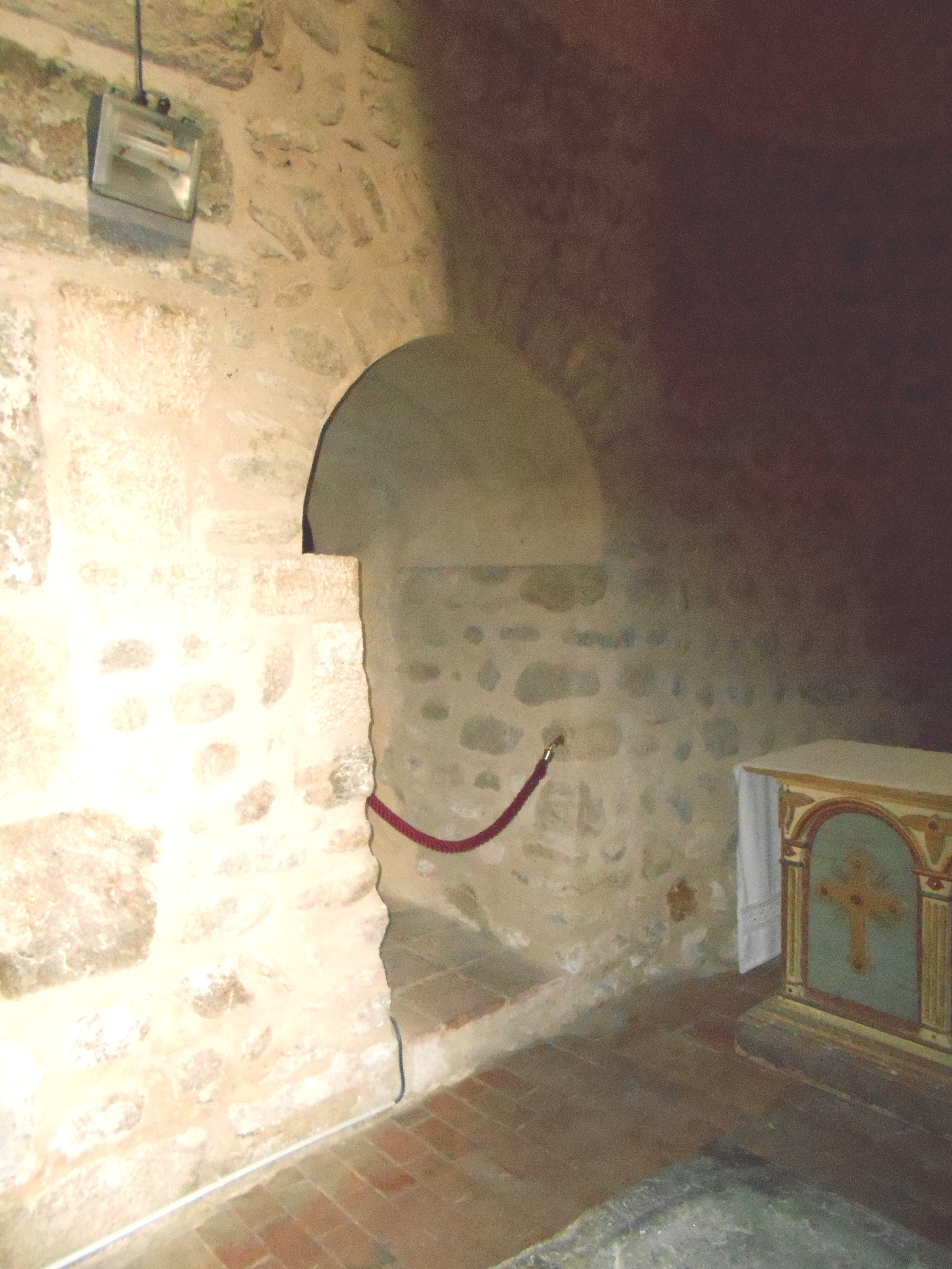 Pas entre absis a Sant Genís de Fontanes